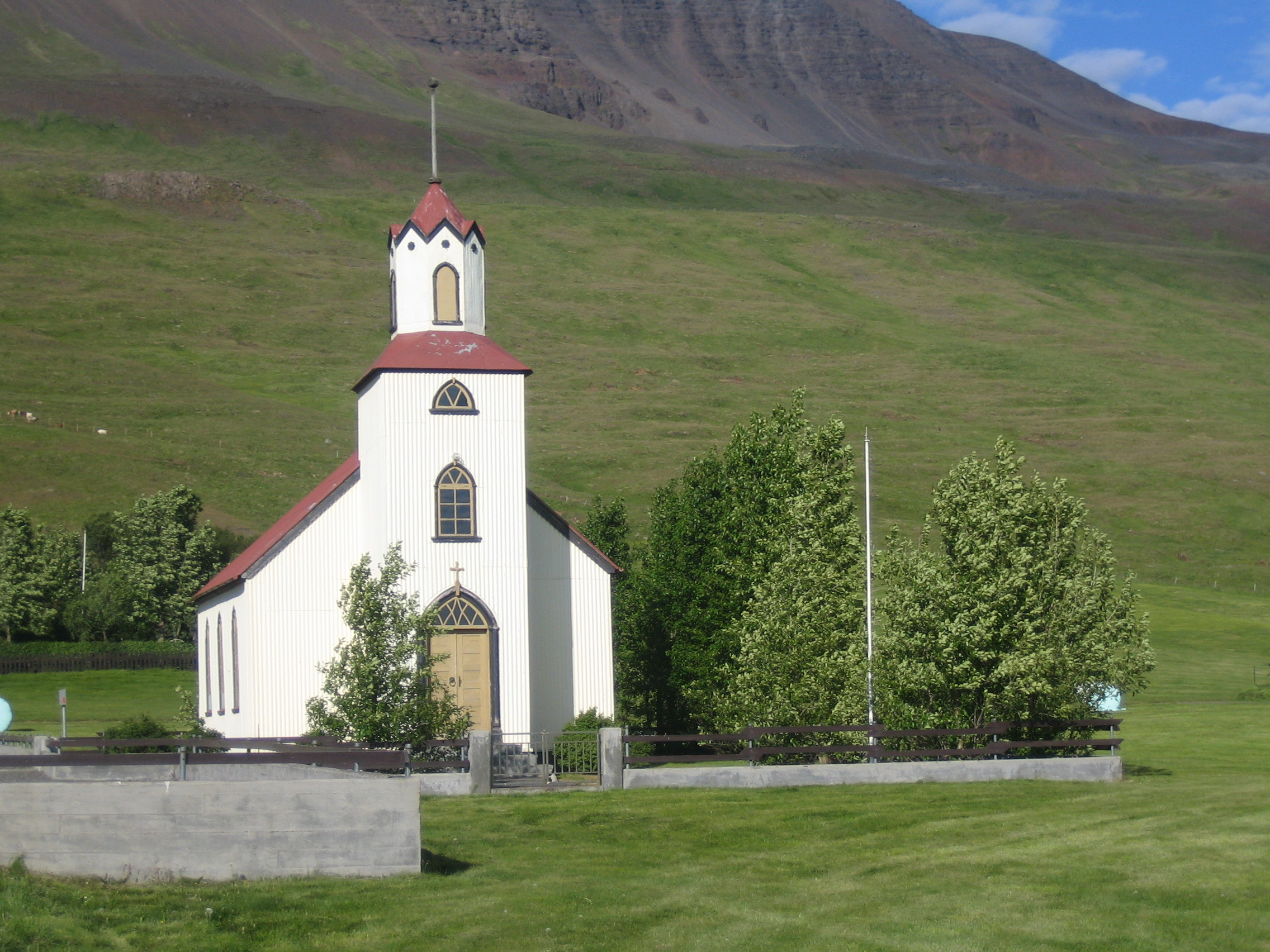 Holtastaðakirkja í Húnavatnsprófastsdæmi